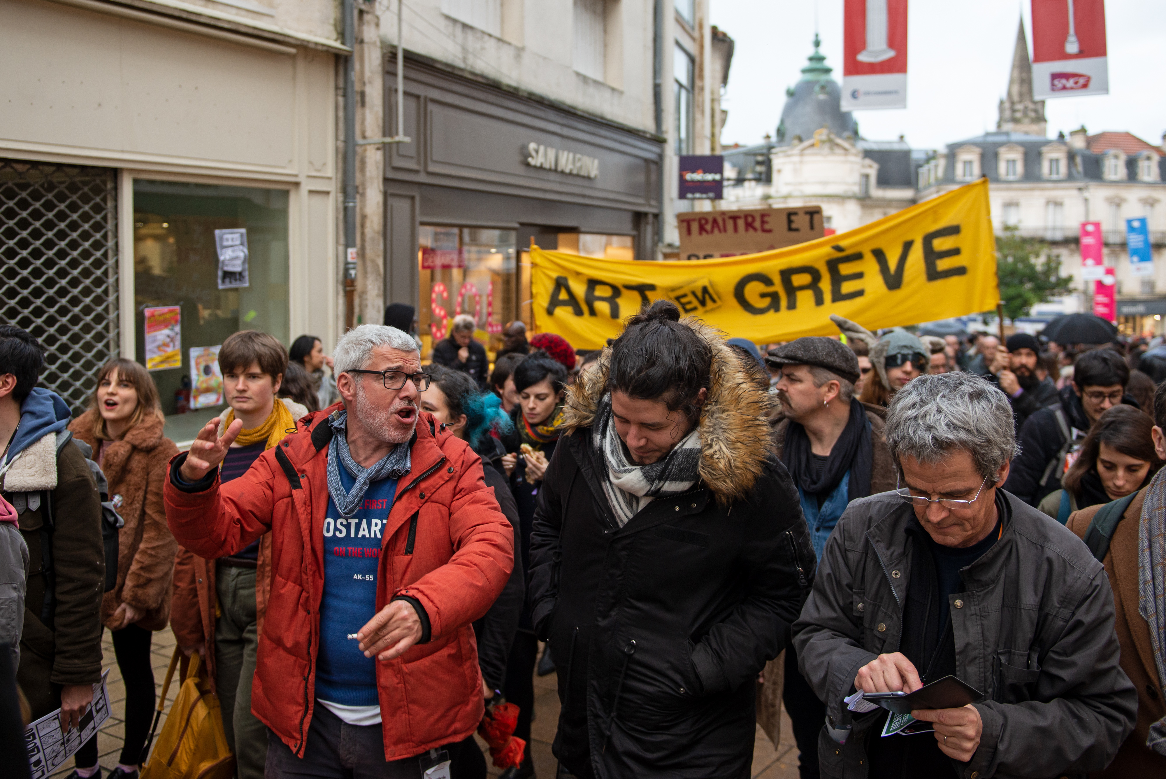 Manifestation des auteurs - Festival International de la Bande Dessinée d'Angoulême 2020.